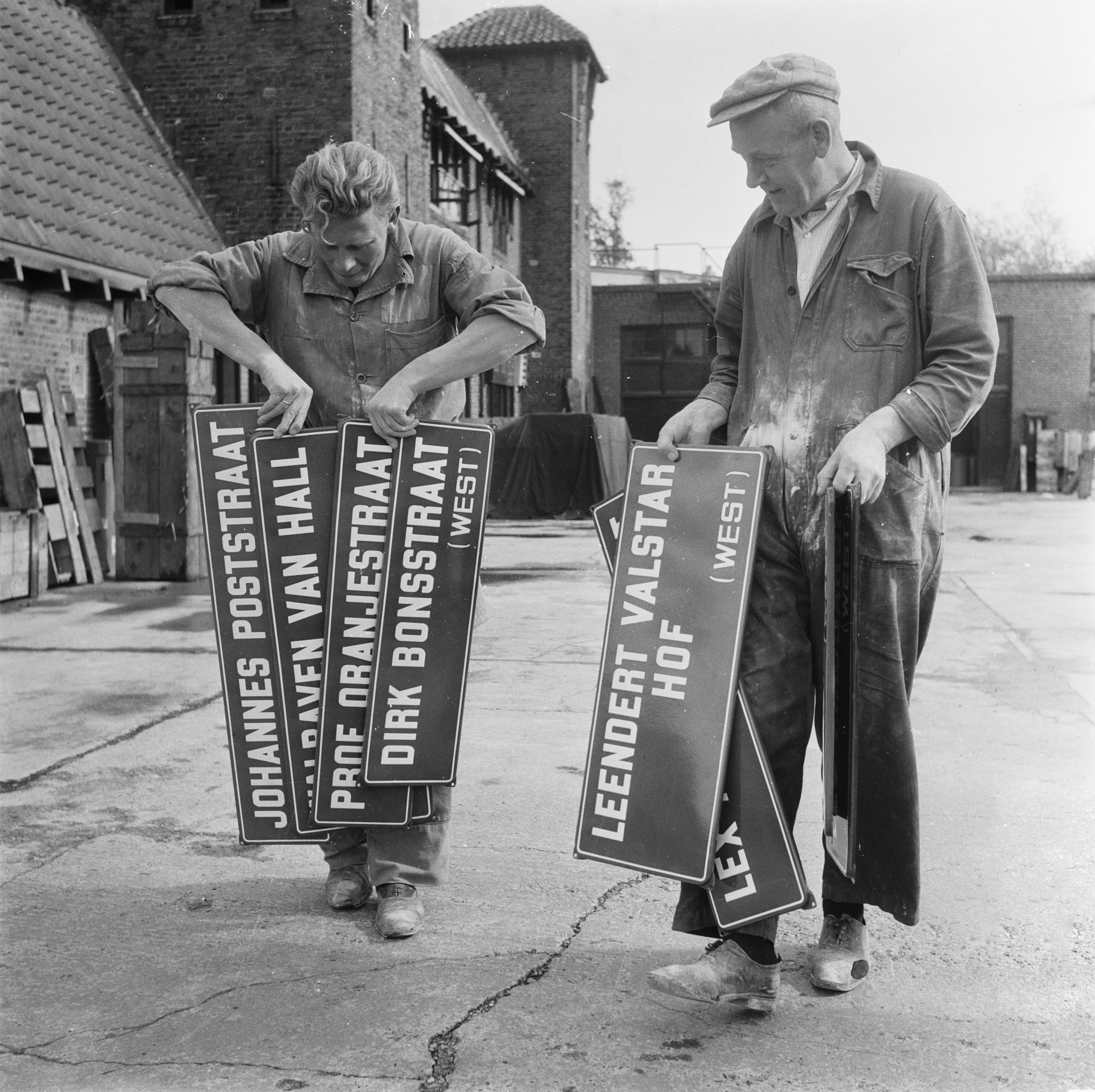 Collectie / Archief : Fotocollectie Anefo Reportage / Serie : [ onbekend ] Beschrijving : Straatnaamborden verzet tijdens Amsterdam door Fa. Langcat te Bussum Annotatie : Johannes Poststraat, Walraven van Hallweg, Prof. Oranjestraat, Dirk Bonsstraat, Lex Althofsstraat, Leendert Valstarhof, Badrainhof, Leo Frijdahof Datum : 19 september 1952 Locatie : Bussum Trefwoorden : naamborden Fotograaf : Noske, J.D. / Anefo Auteursrechthebbende : Nationaal Archief Materiaalsoort : Negatief (zwart/wit) Nummer archiefinventaris : bekijk toegang 2.24.01.03 Bestanddeelnummer : 905-3192 Reacties Geplaatst door Amsterdammertje op 05 oktober 2015 - 15:13. Straatnaamborden van verzetsstrijders voor de tuinstad Slotermeer (Amsterdam-West)